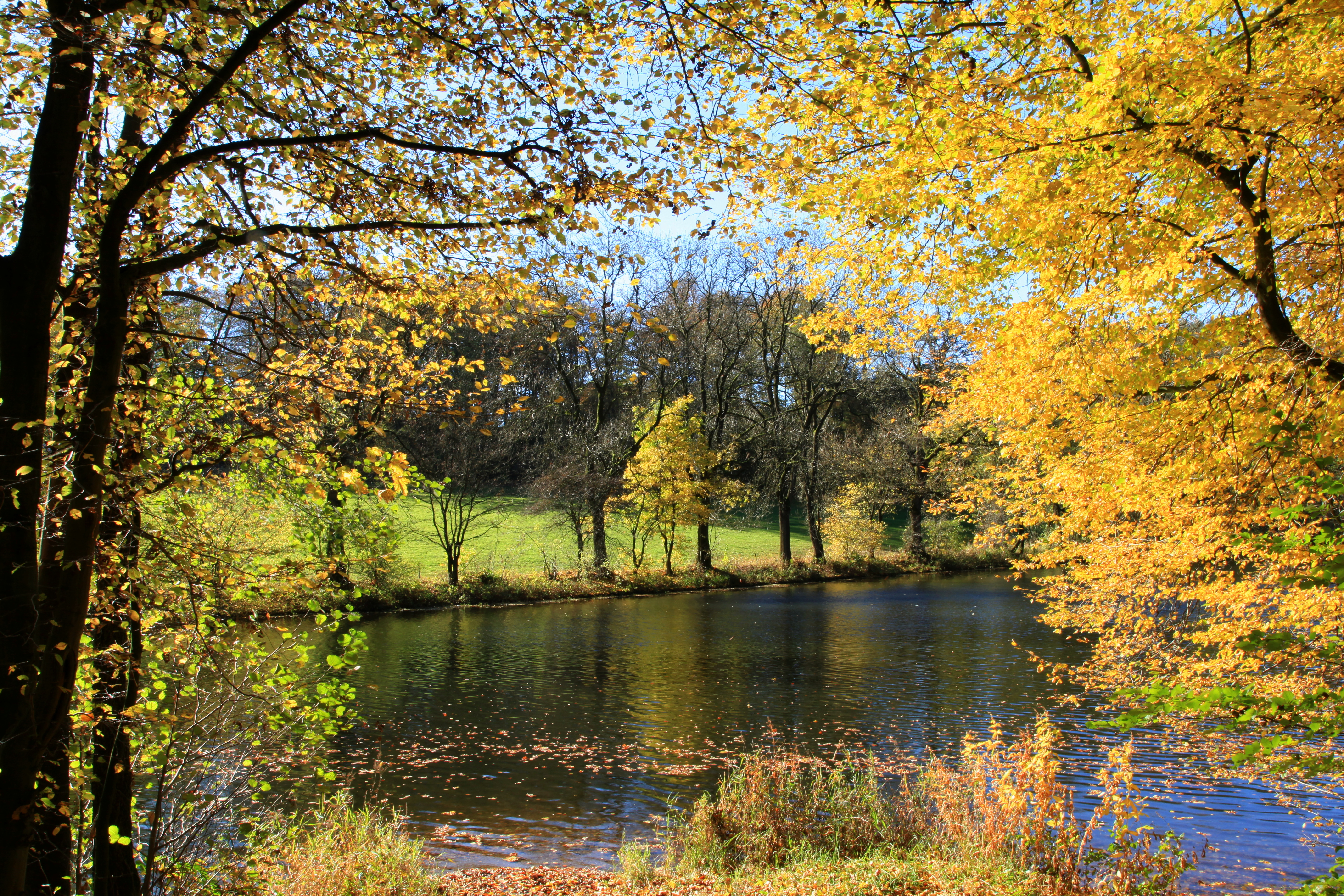 Heilenbecker Talsperre in Breckerfeld (Grünland nördlich Schiffahrt)